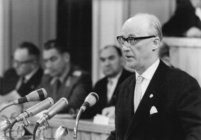 Zentralbild/Sturm-12.9.1960 14. Volkskammersitzung in Berlin - Wahl des Staatsrates Auf der Tagesordnung der 14. Sitzung der Volkskammer der DDR, die am 12.9.1960 um 12 Uhr eröffnet wurde, steht das Gesetz über die Bildung des Staatsrates der Deutschen Demokratischen Republik. UBz: Volkskammerpräsident Dr. Dieckmann begründet den Entwurf eines Gesetzes über die Bildung des Staatsrates der DDR.